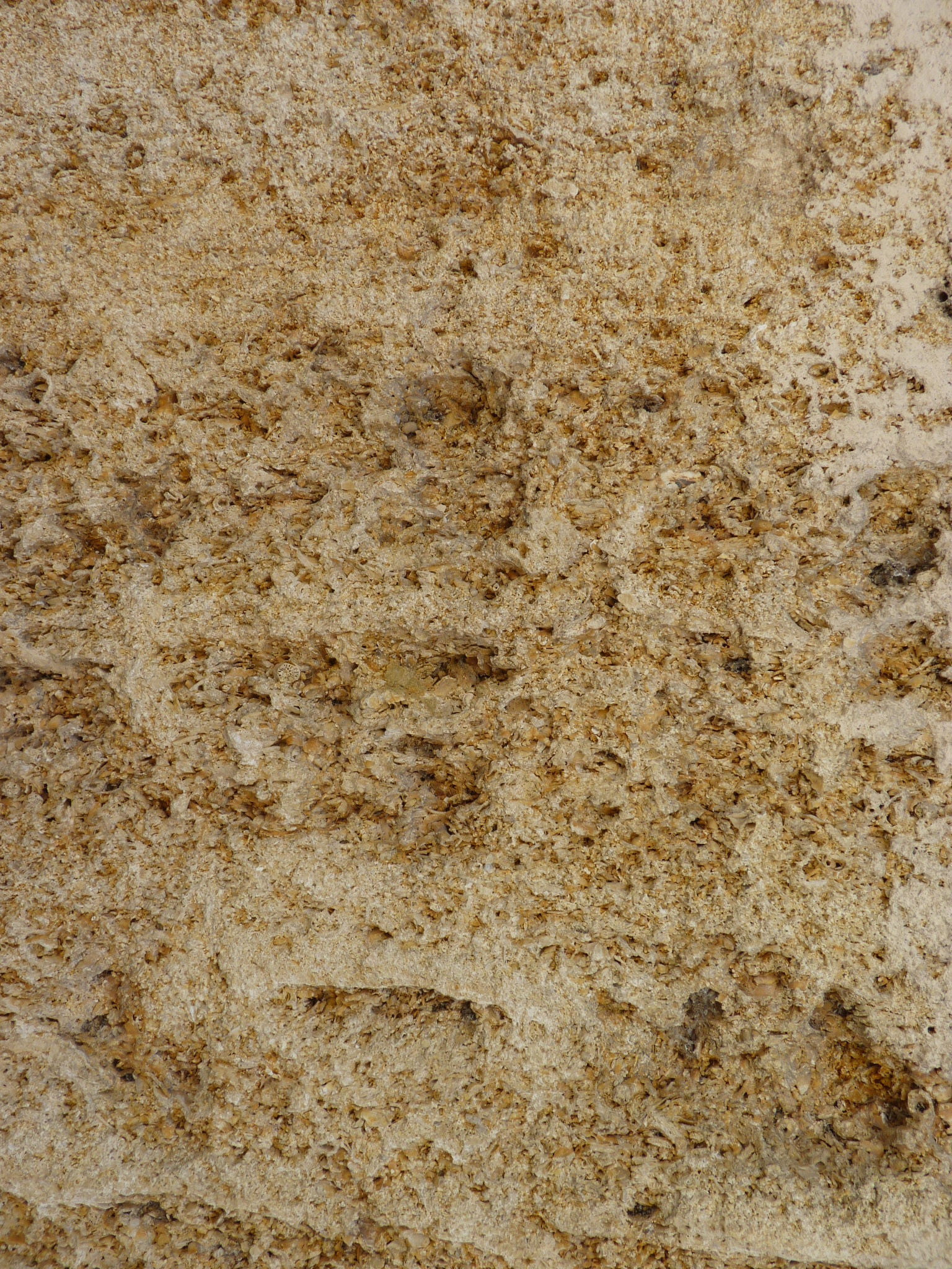 roche calcaire jaunâtre utilisée comme pierre de construction en Gironde (ici sur une maison de Sainte Foy La Grande). Ce calcaire d'origine marine est riche en débris coquilliers, spicules d'astéries(étoiles de mer) et coraux. Il est daté de l'Oligocène (32 millions d'années) .